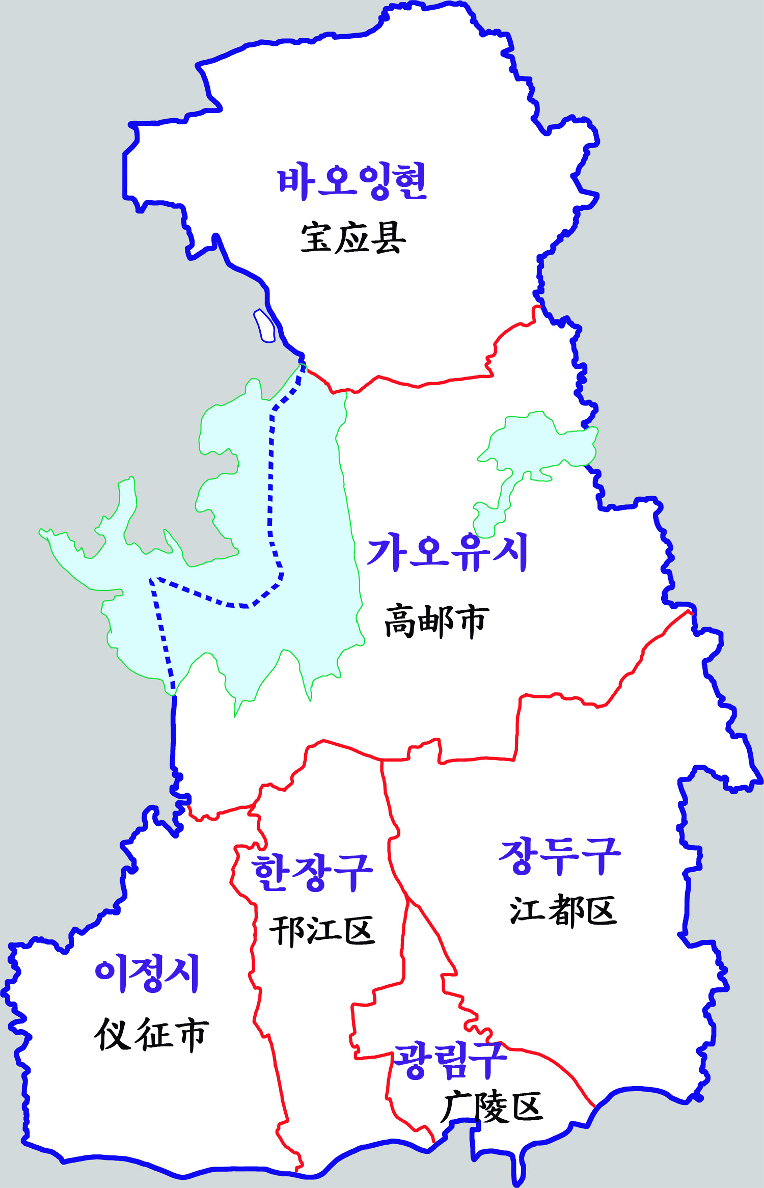 양저우시 현급구역도